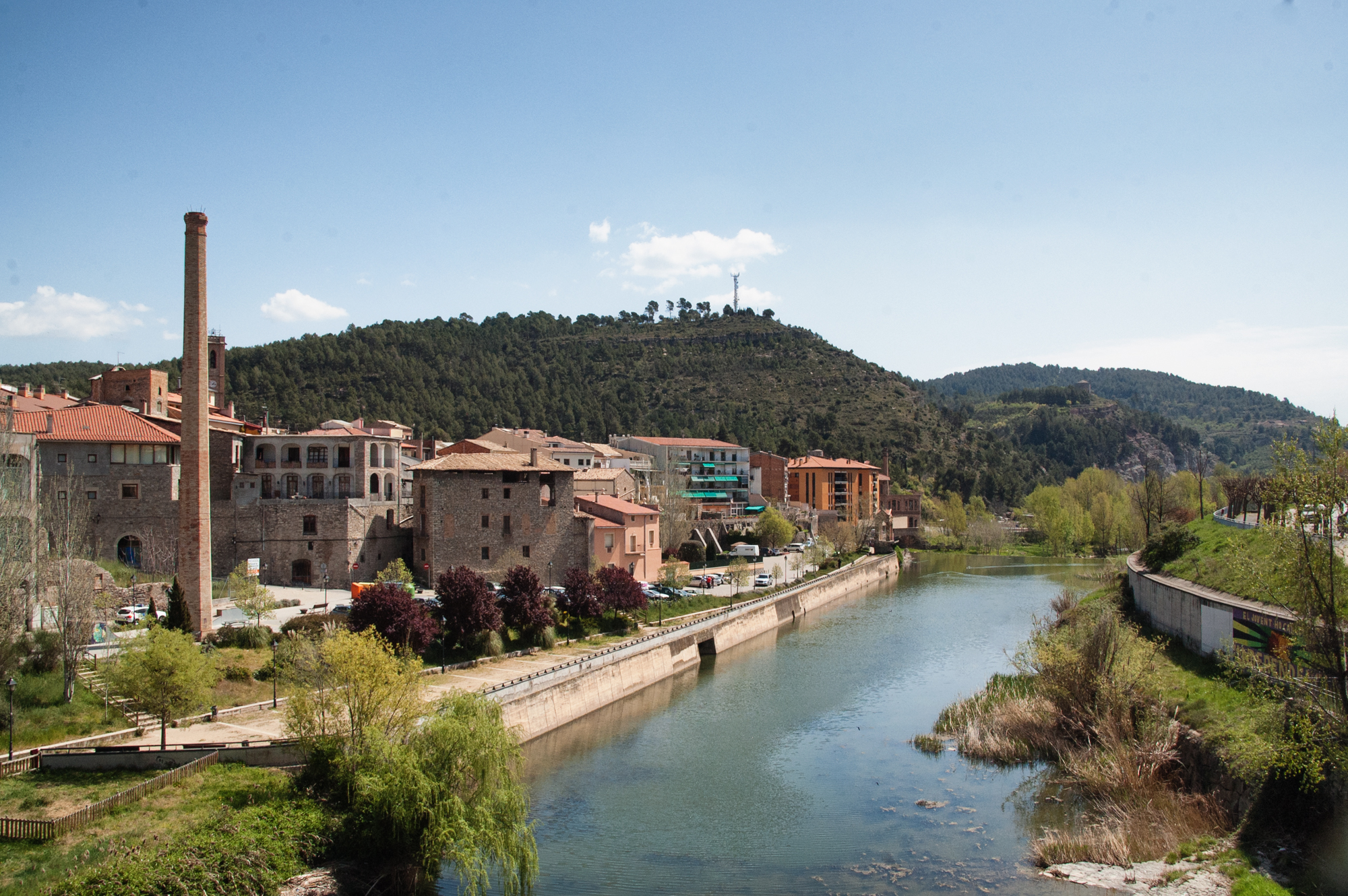 vista del riu llobregat i la muntanya serrat del xipell